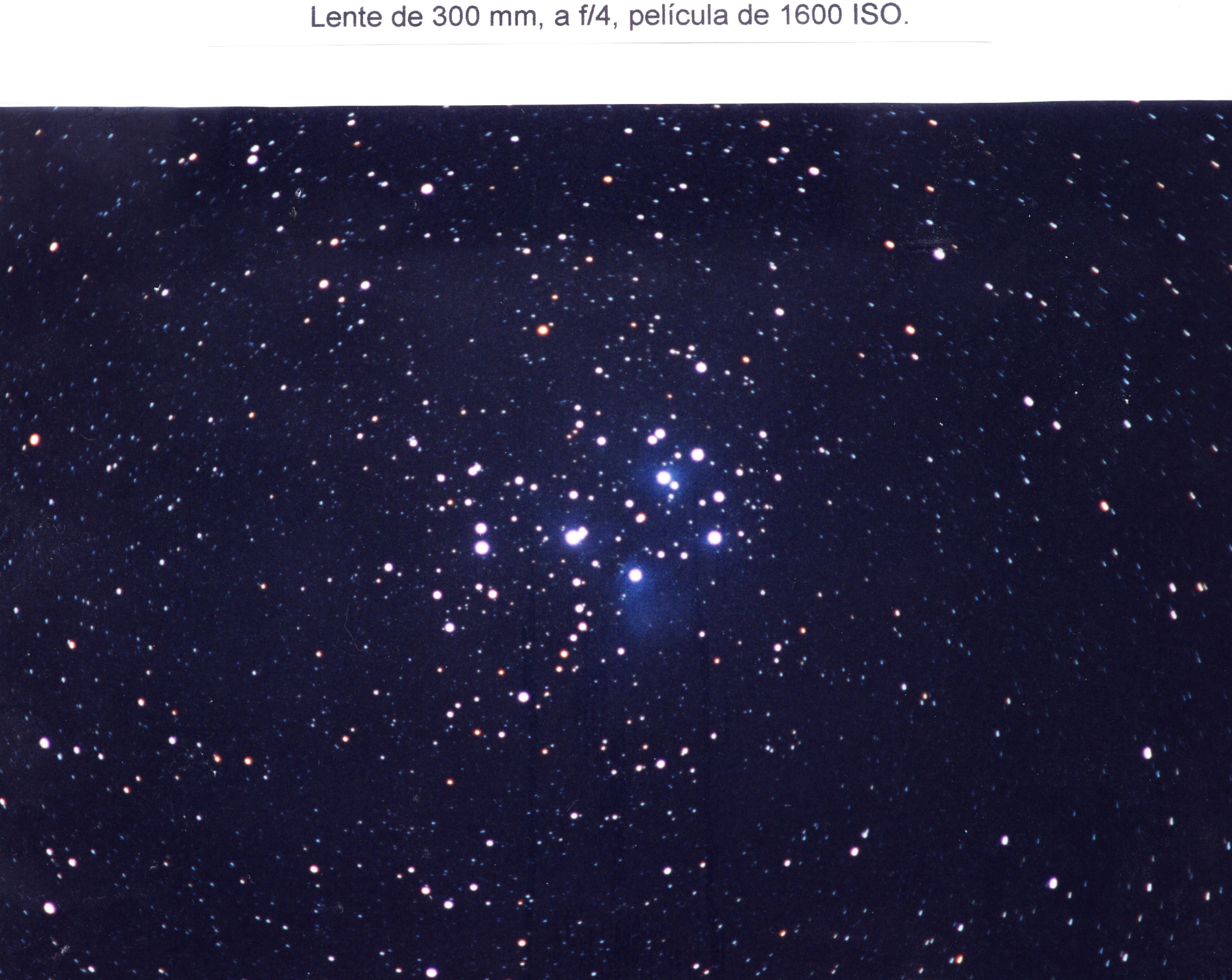 Las Pléyades (M 45). Lente 300 mm a f/4; película 1600 ISO, exp. 30 min.